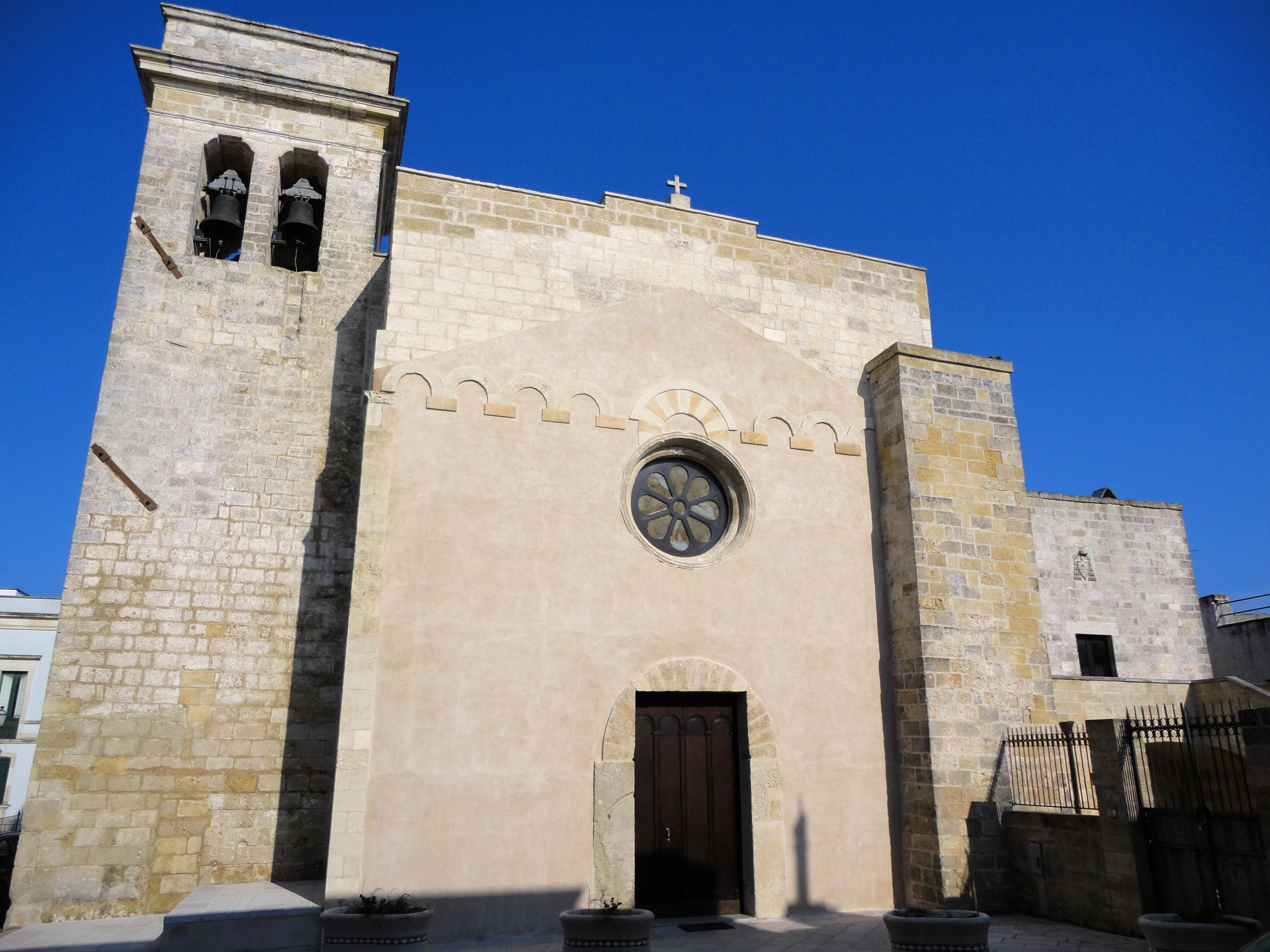 Chiesa Concattedrale di Castro, Lecce